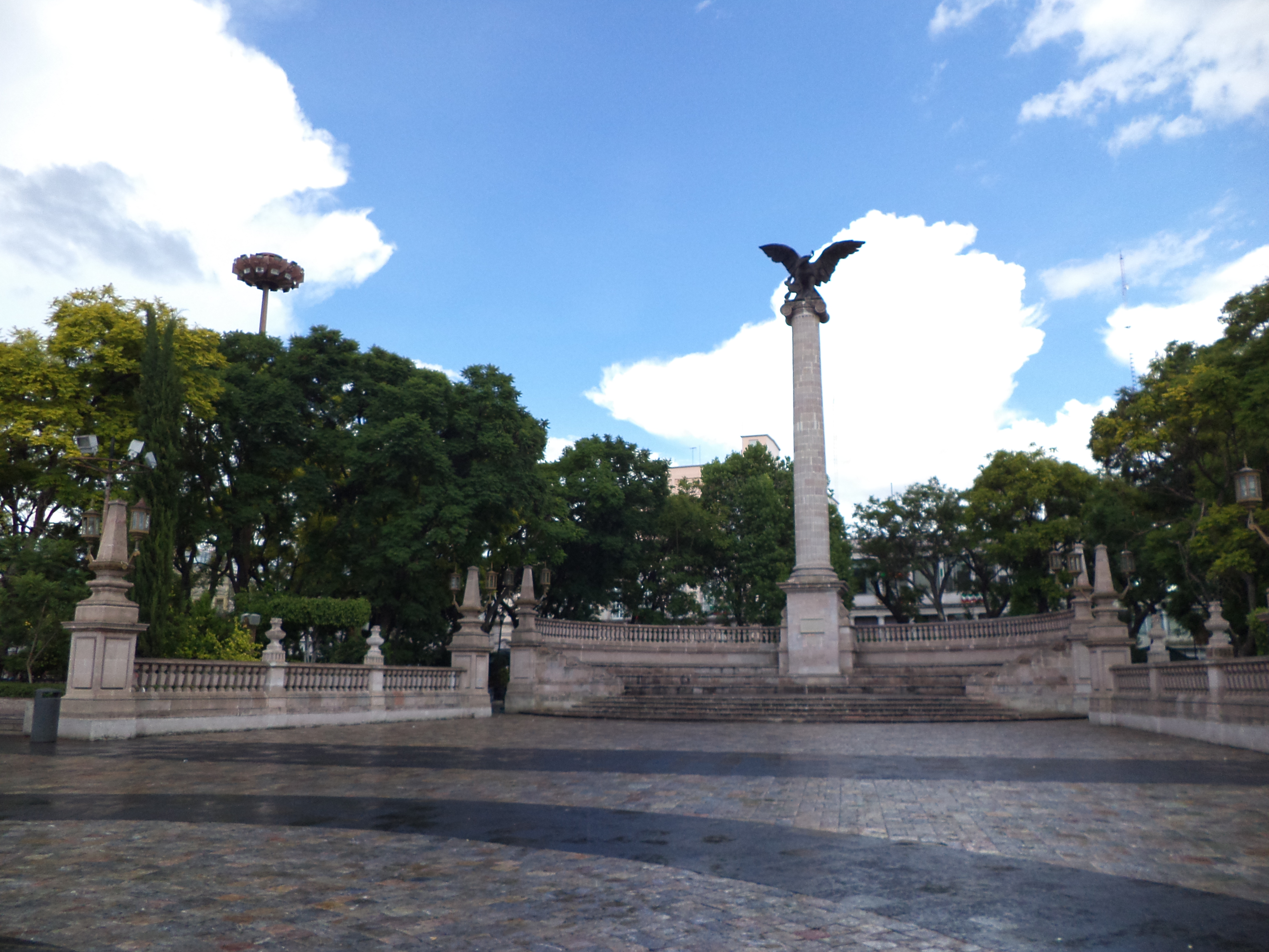 Plaza panoramica 2